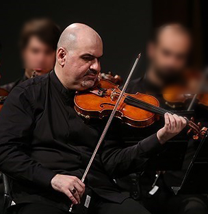 مازیار ظهیرالدینی - کنسرت ارکستر سمفونیک تهران ۲۴ مرداد ۱۳۹۷ تالار وحدت تهران